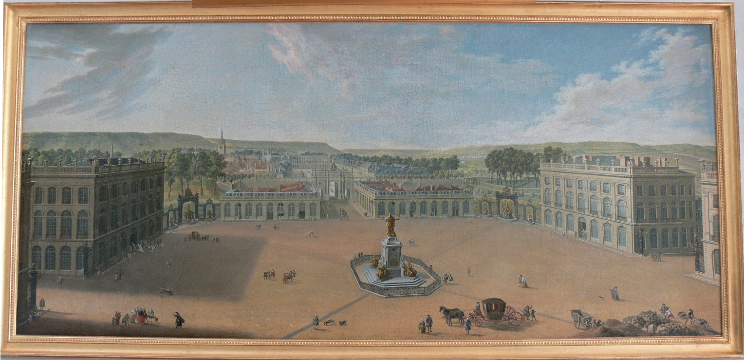 Place Stanislas à Nancy vers 1760. Artiste inconnu. Tableau dit « de Pange » (tableau situé au château de Pange).